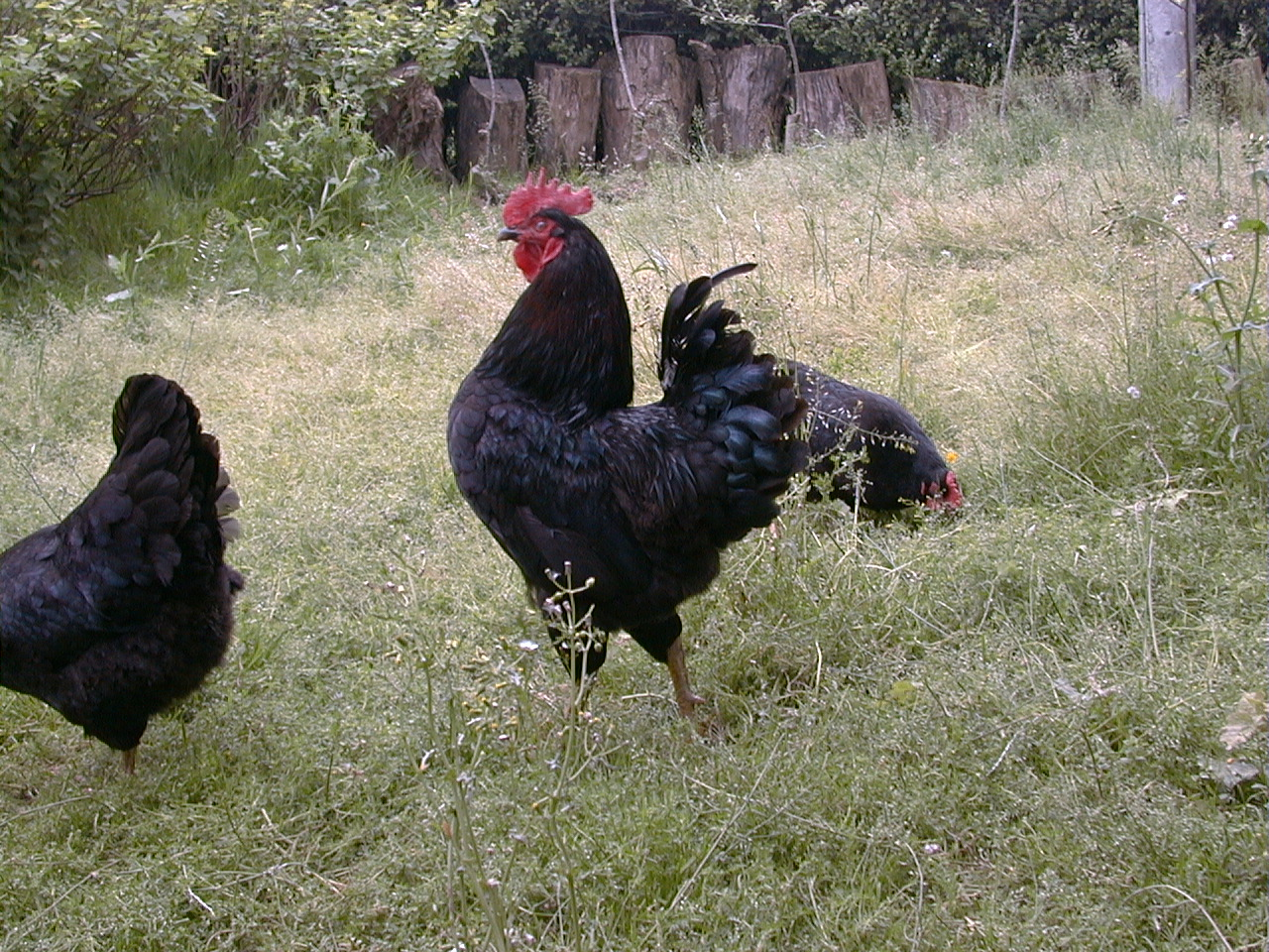 Euskal oiloa barietate beltza. Oilarra